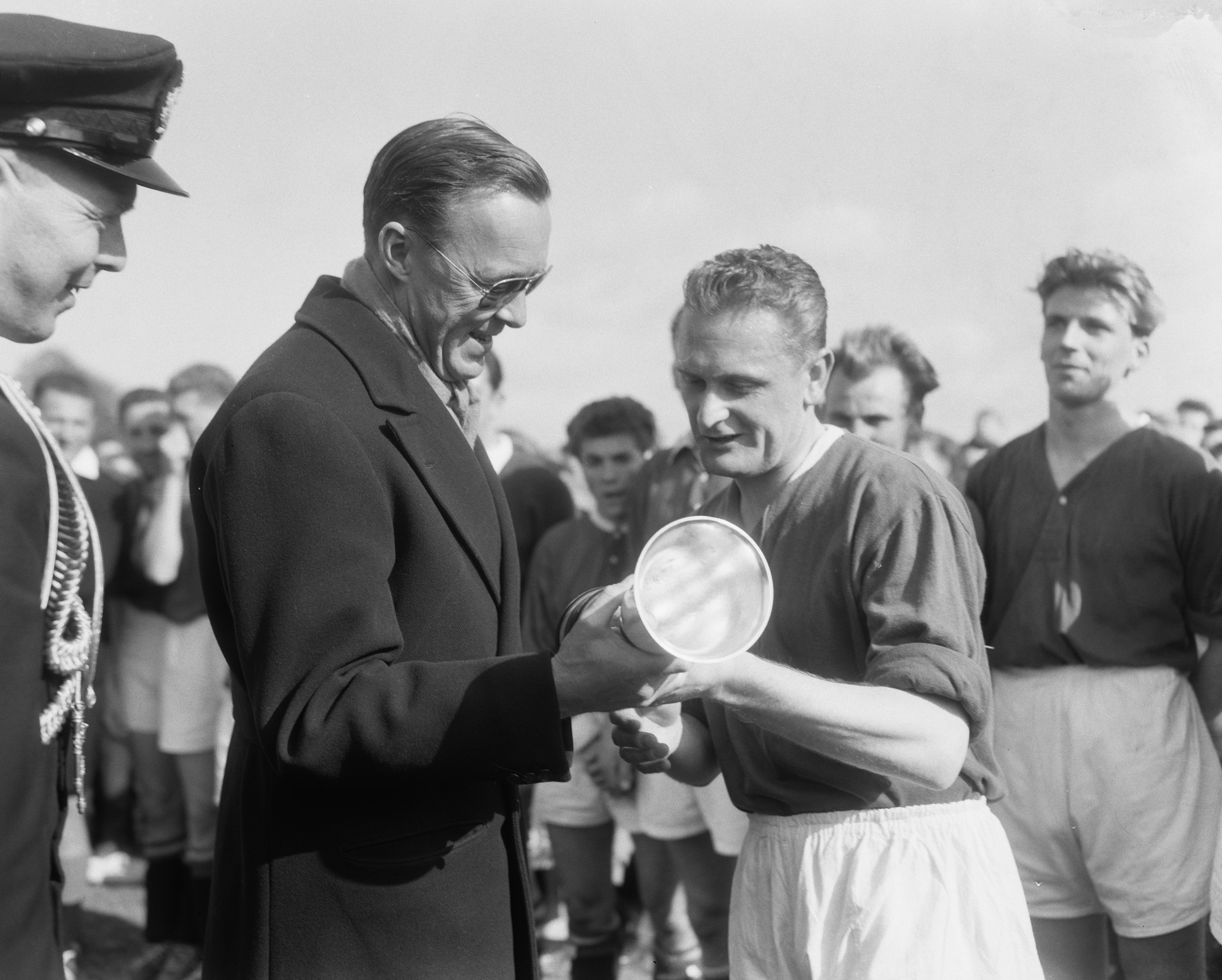 Collectie / Archief : Fotocollectie Anefo Reportage / Serie : [ onbekend ] Beschrijving : Voetbal. Ajax tegen PSV om beker van Prins Bernhard . Prins Bernhard met Van Dijk Datum : 30 april 1957 Trefwoorden : bekers, sport, voetbal Persoonsnaam : Bernhard (prins Nederland) Fotograaf : Pot, Harry / Anefo Auteursrechthebbende : Nationaal Archief Materiaalsoort : Negatief (zwart/wit) Nummer archiefinventaris : bekijk toegang 2.24.01.04 Bestanddeelnummer : 908-5410